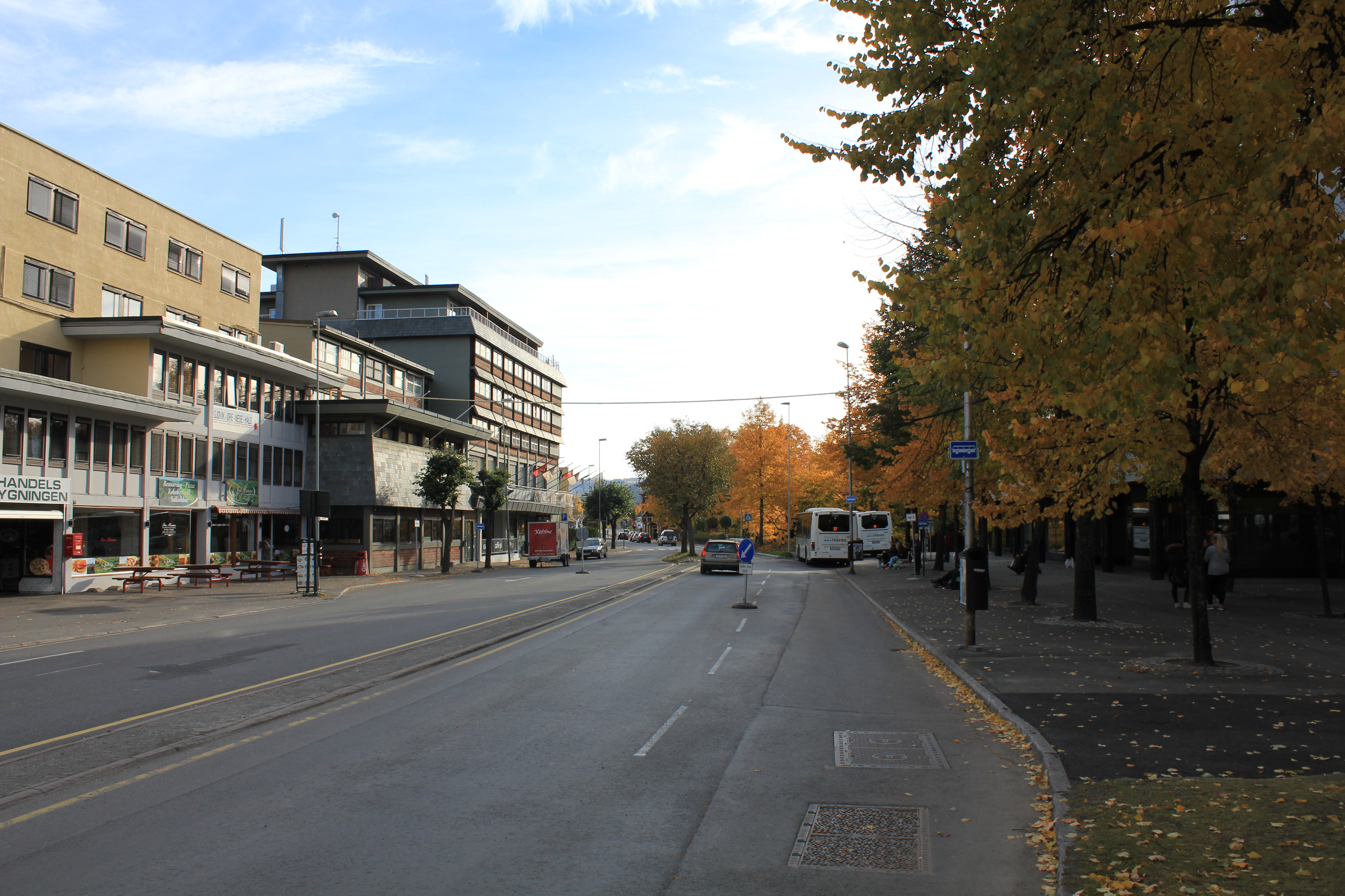 Strandgata i Gjøvik.